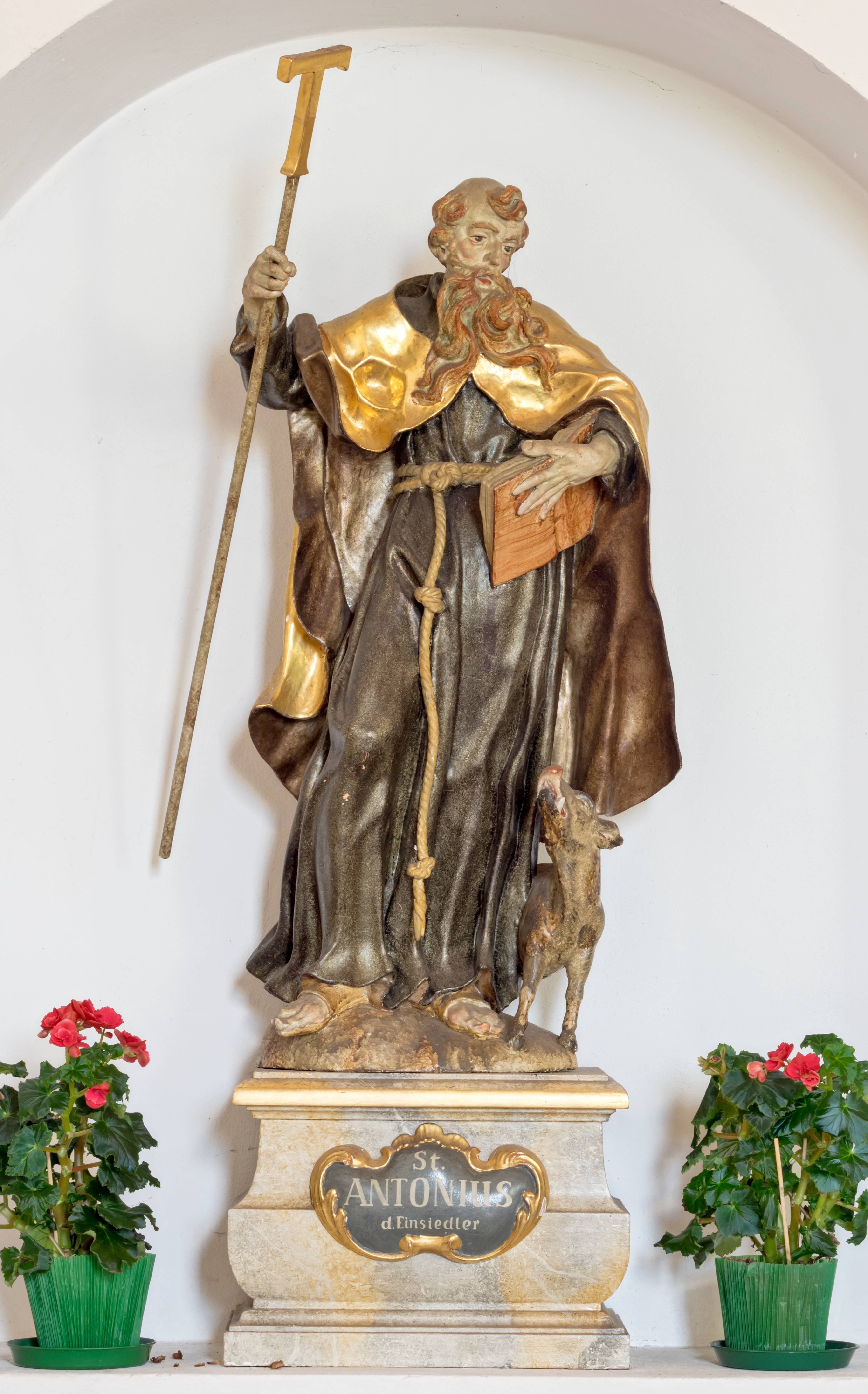 St. Andreas in Furtwangen Neukirch Die Figurengruppe südlich vom Altar